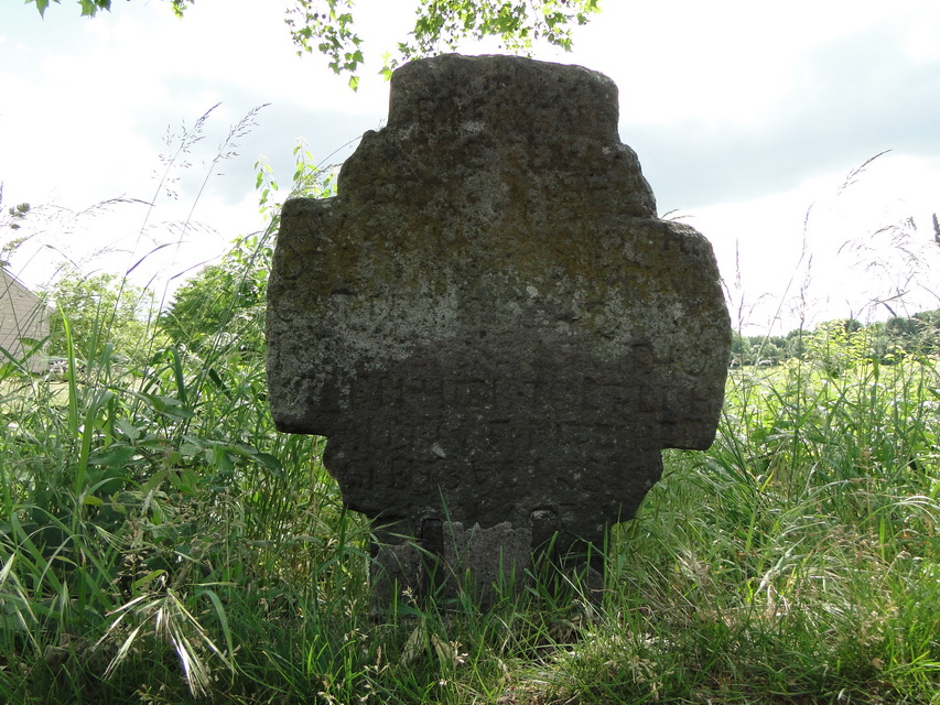 Das Wegekreuz, bei dem es sich eventuell um ein Grabkreuz (Gedenkkreuz) handelt, befindet sich an der Geislarstraße (zwischen Ortseingang und der Burg Lede) und wurde 1820 errichtet. Die Inschrift ist stark verwittert. Nur einzelne Buchstaben bzw. Wörter sind noch zu erkennen. Inschrift: keine